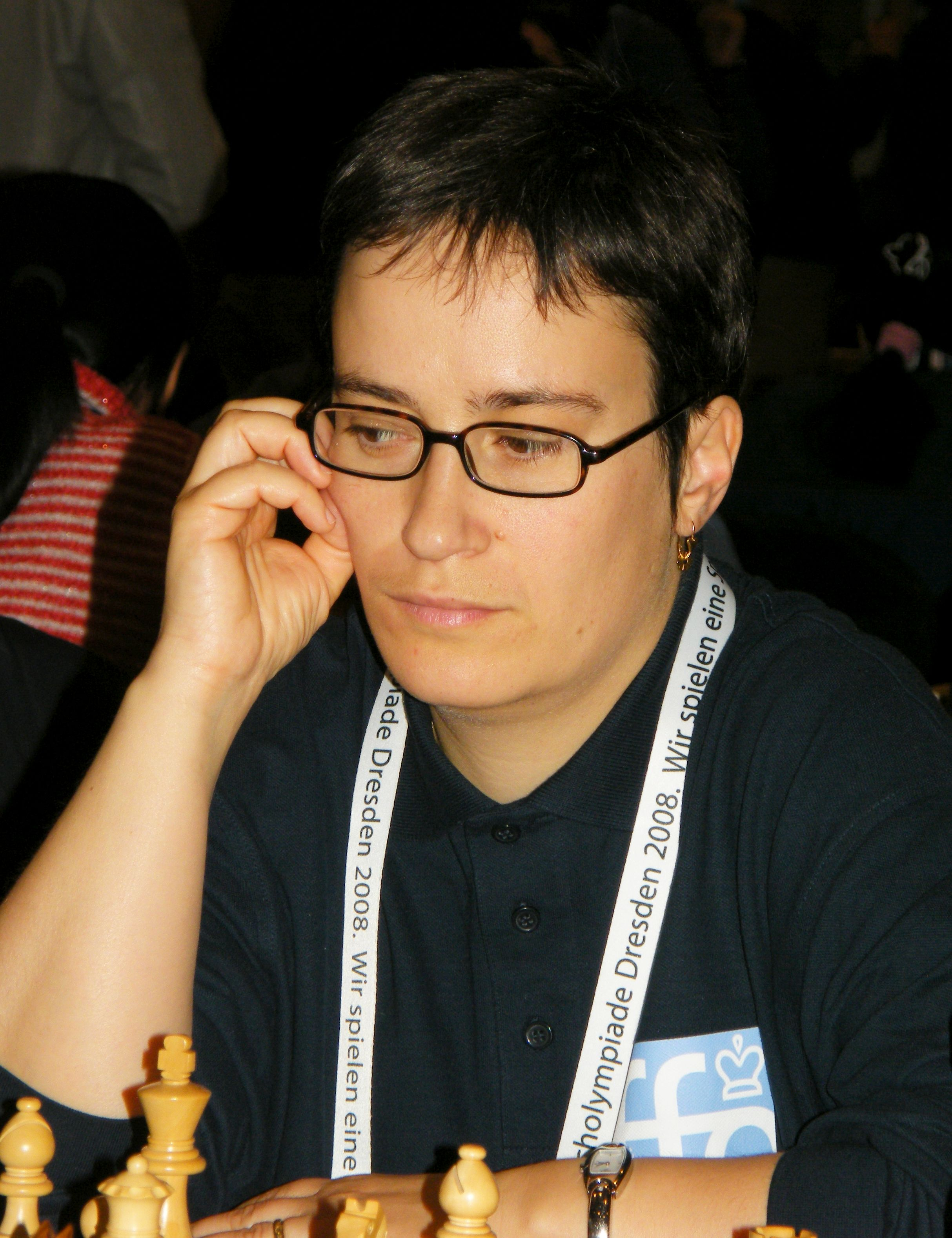 Silvia Collas bei der 38. Schacholympiade in Dresden 2008